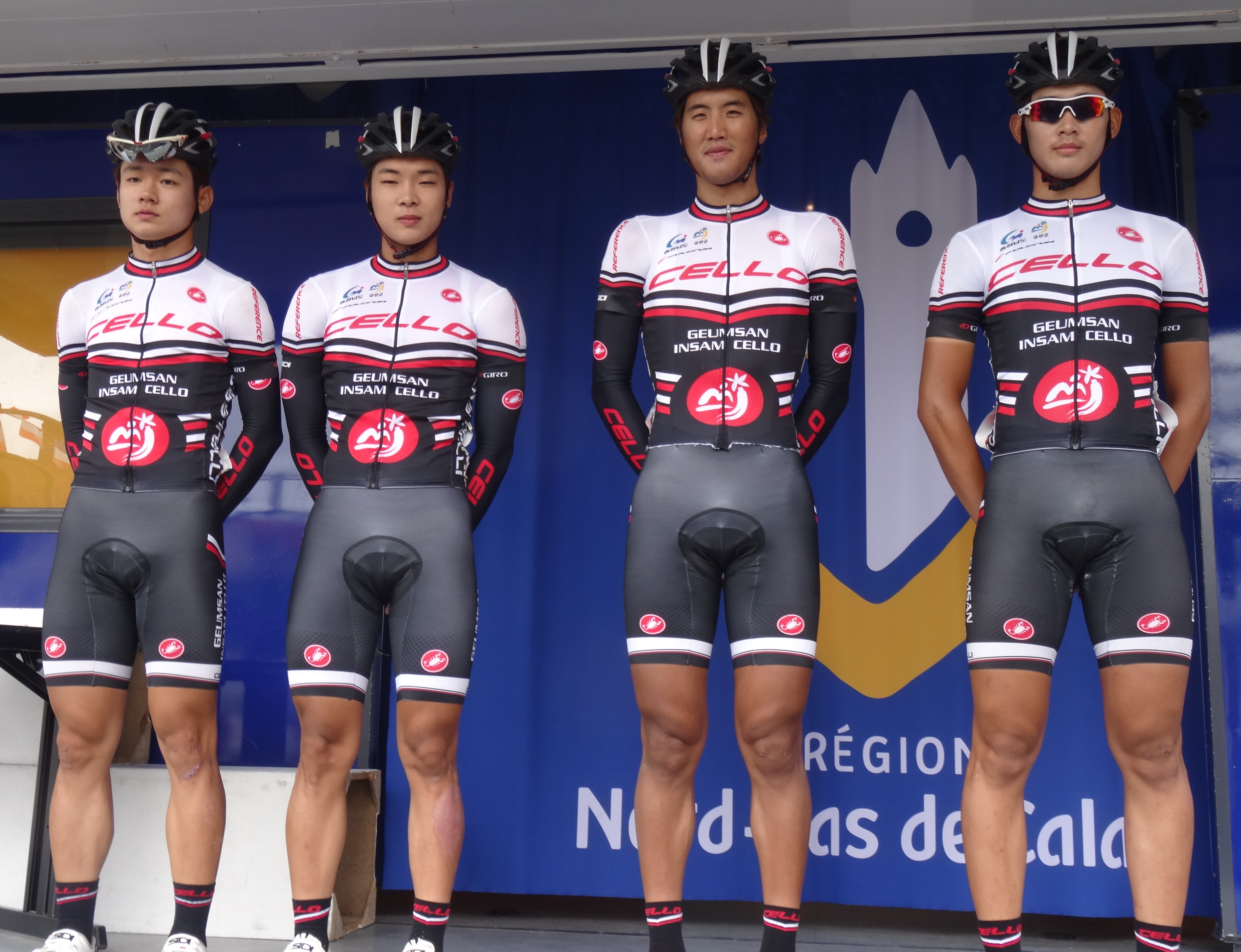 Reportage photographique réalisé le dimanche 13 juillet à l'occasion du départ et de l'arrivée de la Ronde pévéloise 2014 à Pont-à-Marcq, Nord-Pas-de-Calais, France.